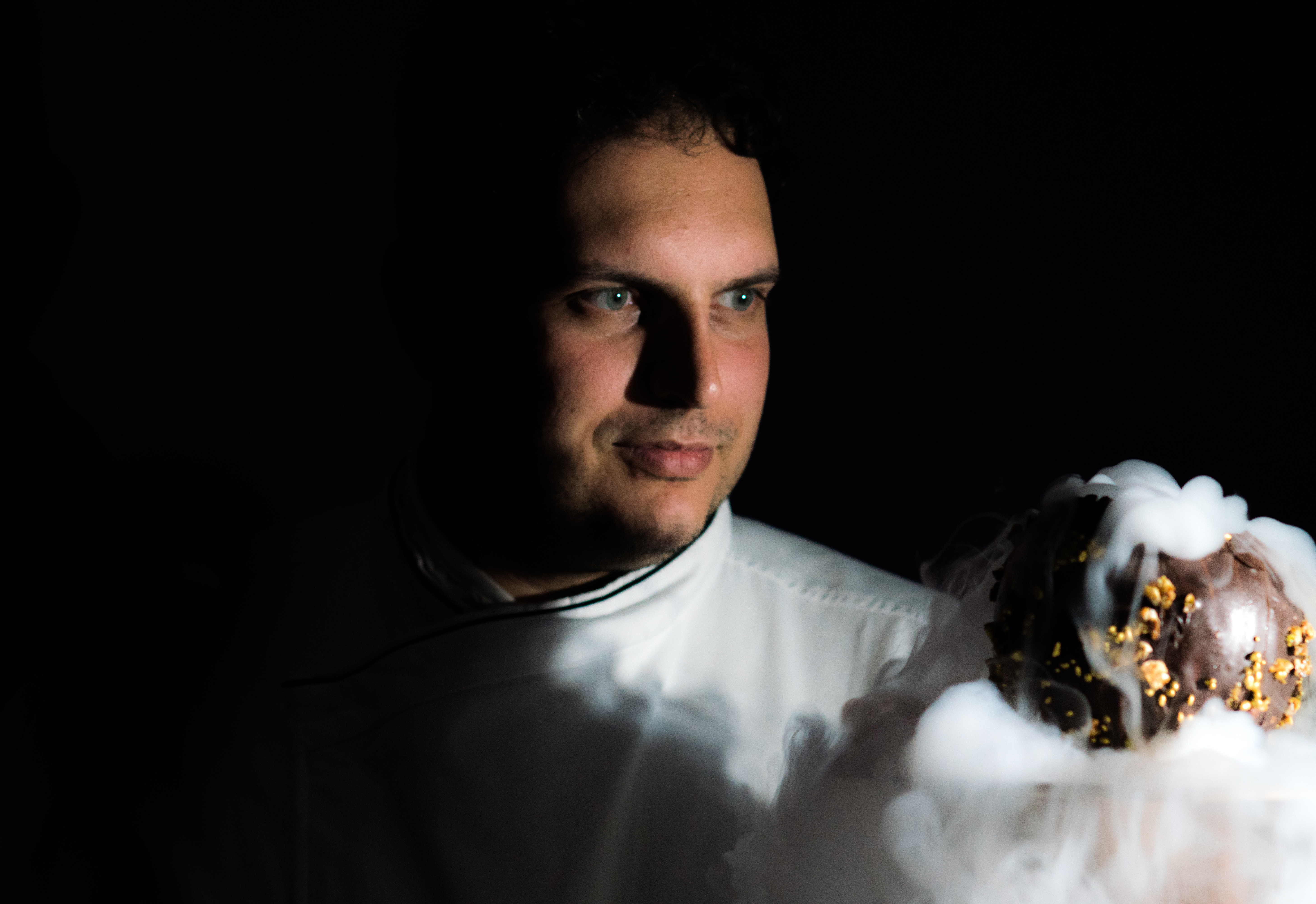 Kuchař